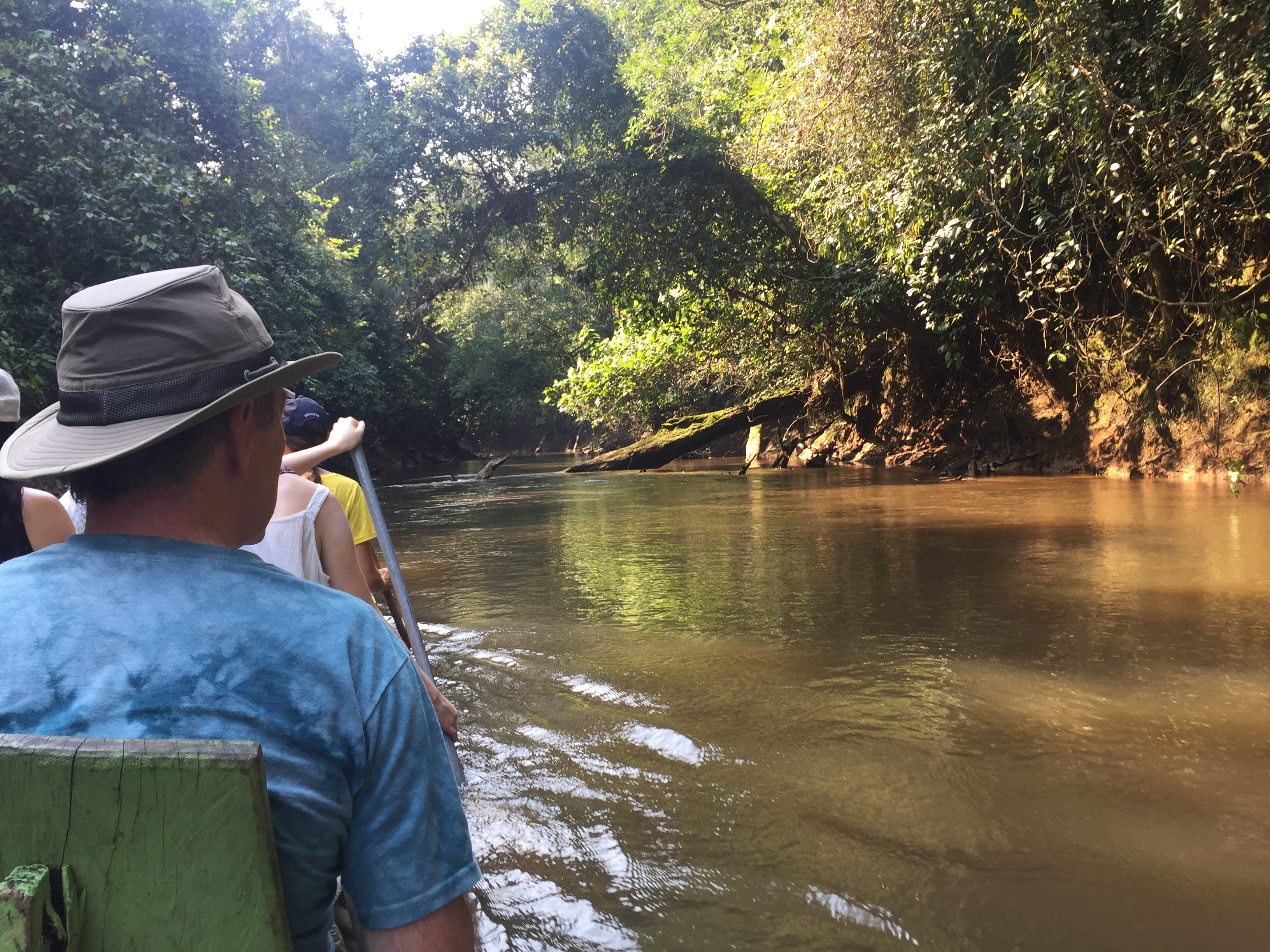 Kanutourismus auf dem Río Cuyabeno im ecuadorianischen Regenwald